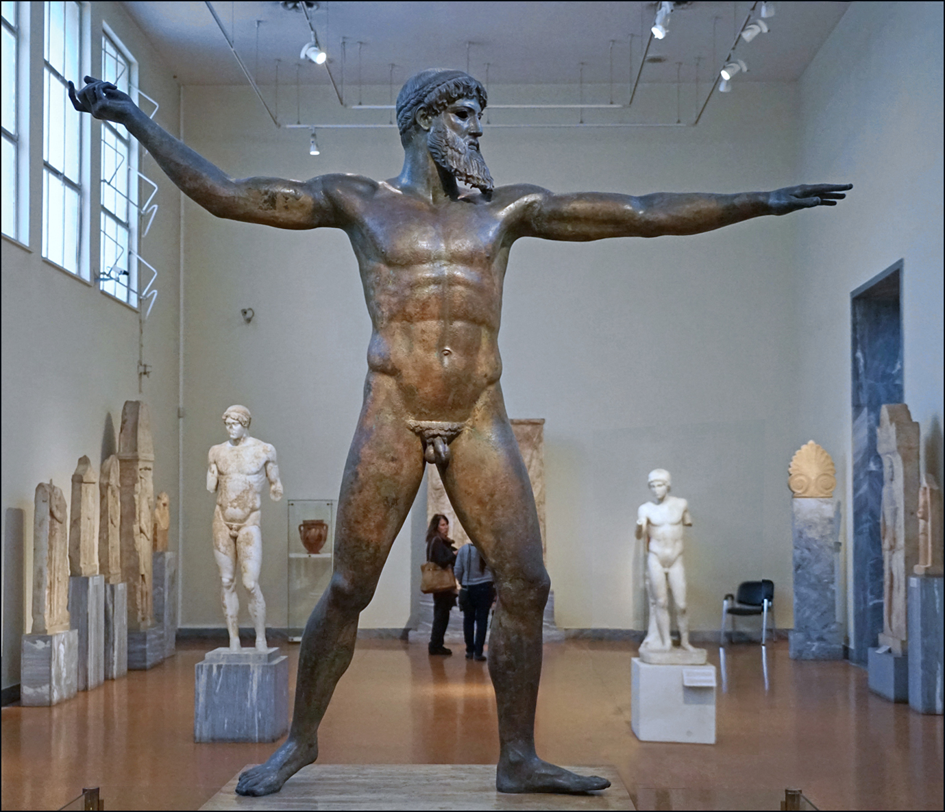 Zeus lançant la foudre (certains archéologues y ont vu Poséidon) Bronze environ 460 av. J.-C. Cette statue, très bien conservée, a été découverte au fond de la mer, au large du cap Artemision, au nord de l'Eubée Le style de cette statue est qualifié de "sévère", un style qui apparaît au début de la période classique, immédiatement après la période archaïque. Oeuvre exposée au musée national d'archéologie (Athènes)